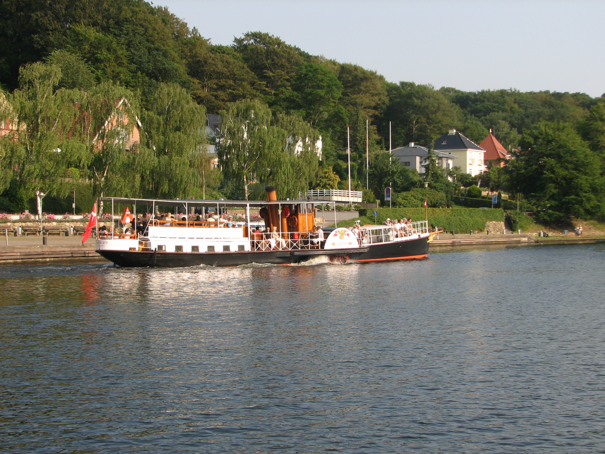 S/S Hjejlen